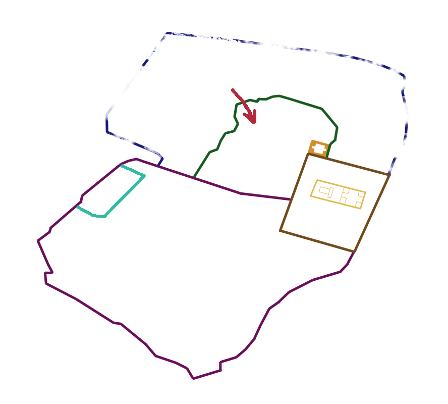 ירושלים 70 - פריצת החומה השנייה